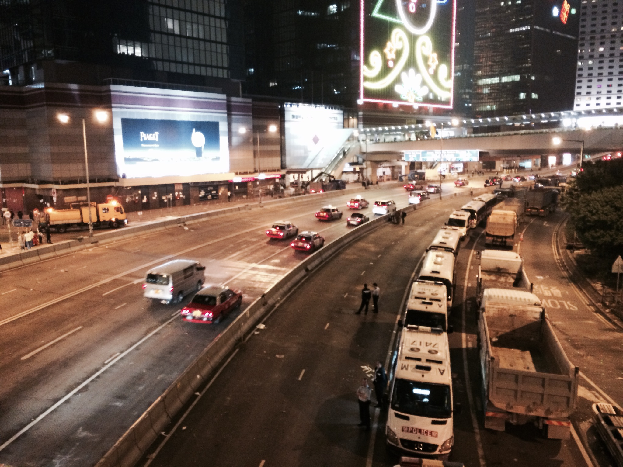 被佔領兩個半月的金鐘夏慤道星期四晚九點左右，西行線恢復通車